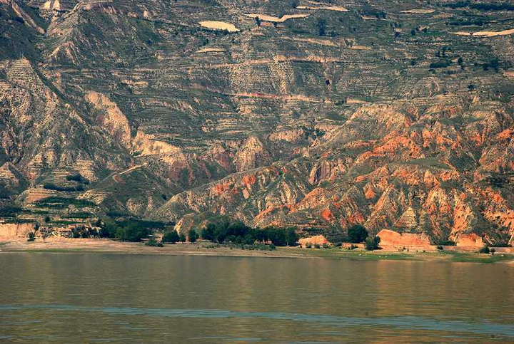 洮河 刘家峡水库